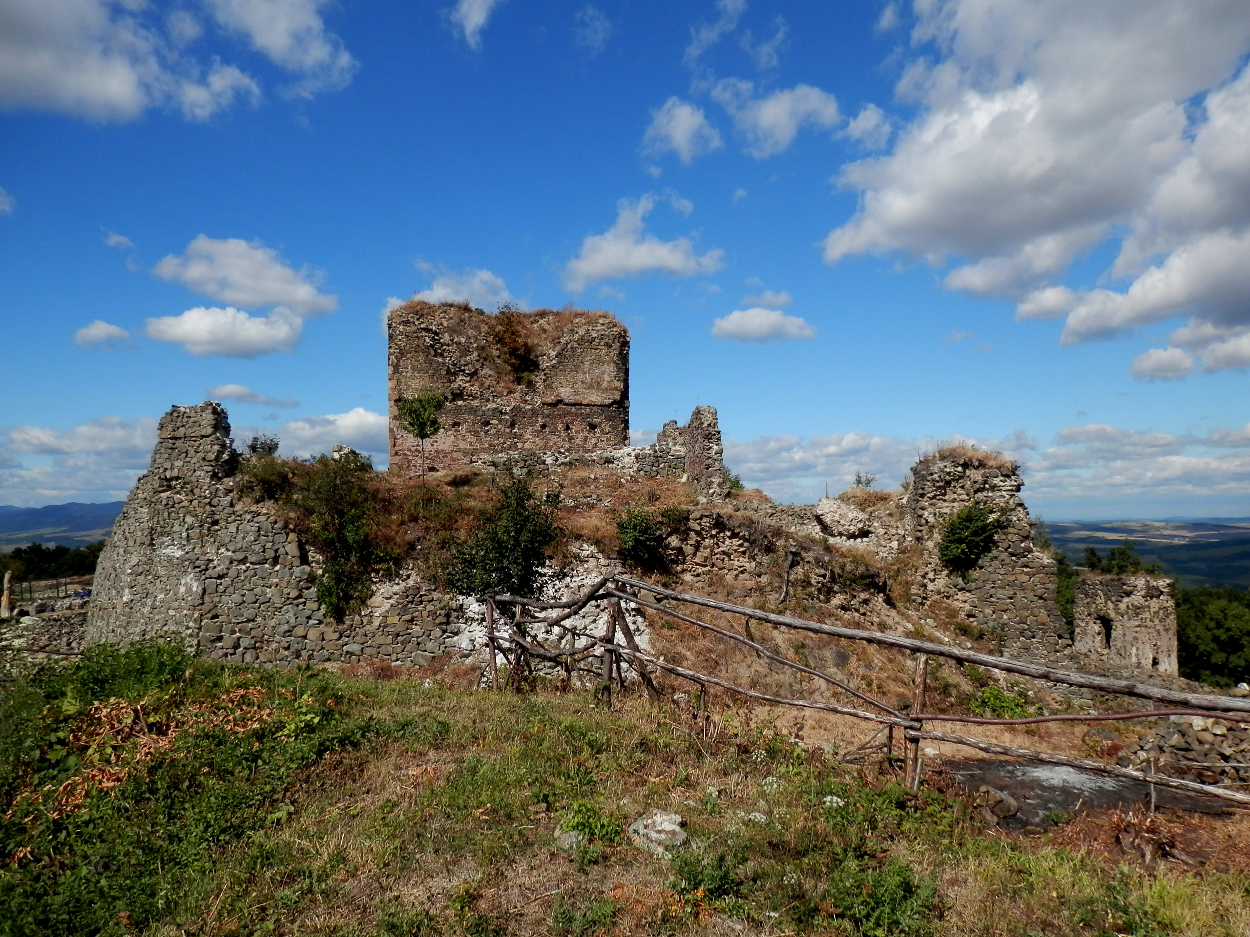 Rekonštruované stavby Šarišského hradu. Mesto Veľký Šariš okres Prešov. Object location49° 03′ 09.62″ N, 21° 10′ 32.61″ E